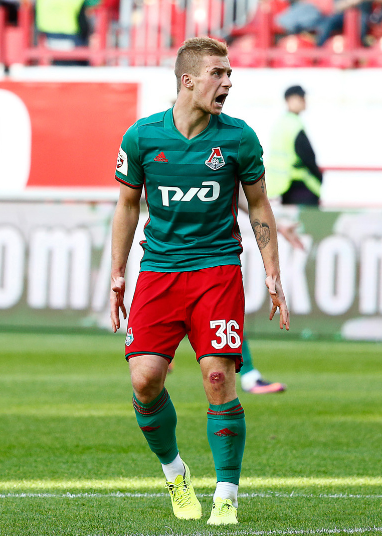 «Локомотив» - «Рубин»